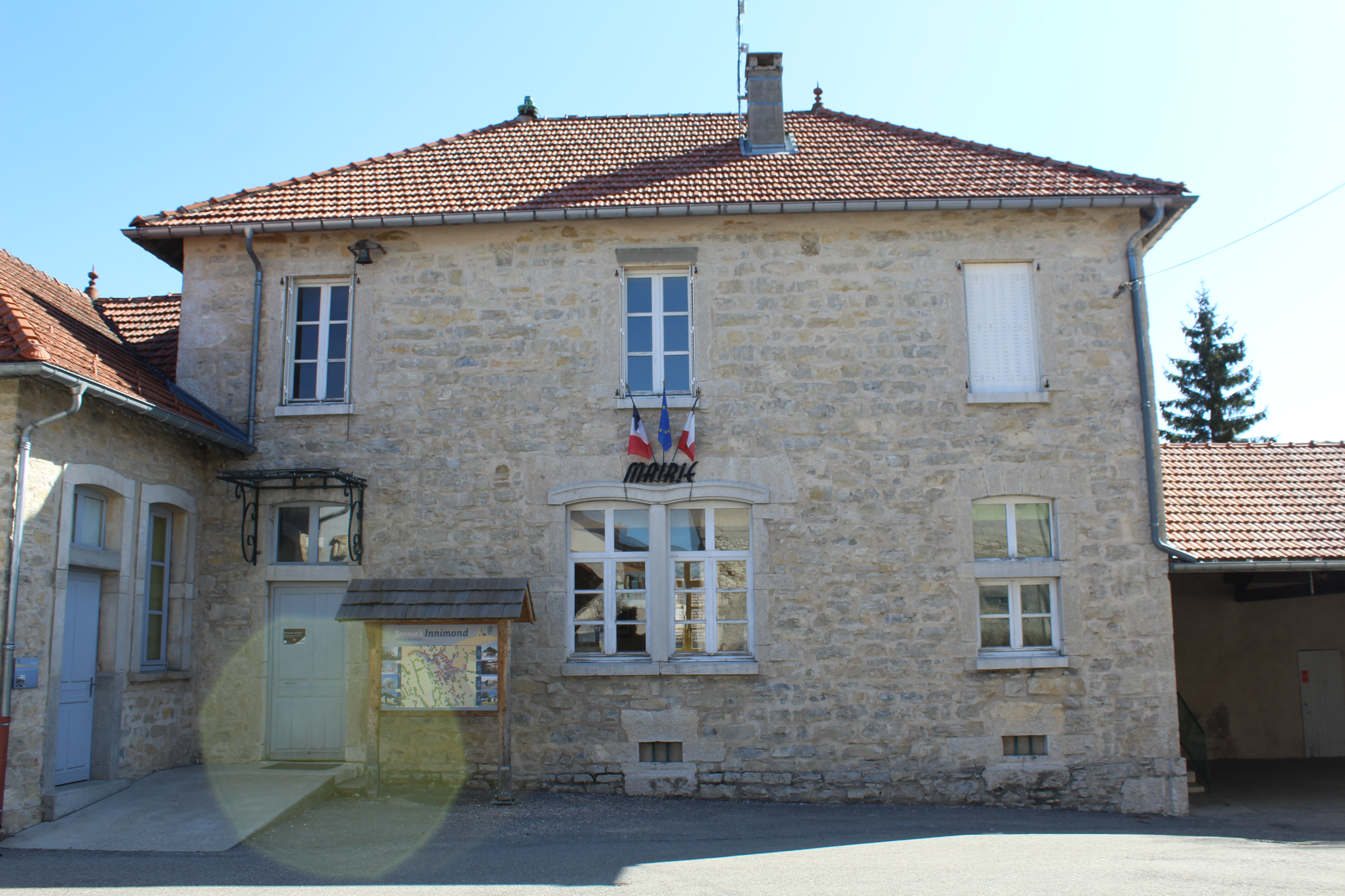 Mairie d'Innimont.